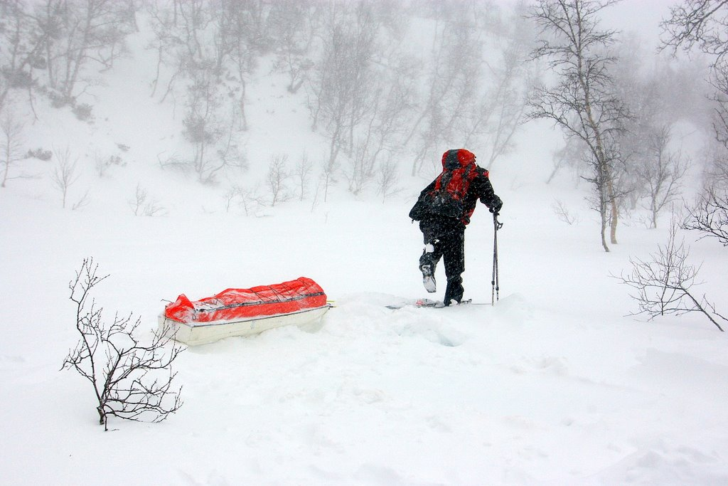 fjällpulka